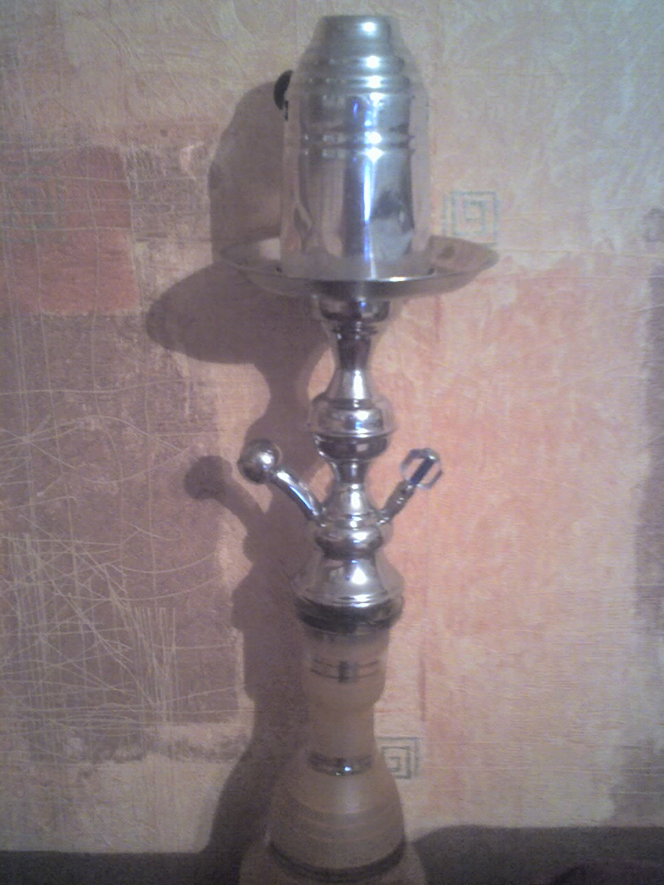 Кальян, Hookah